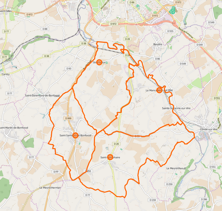 Carte de la commune nouvelle et ses communes déléguées